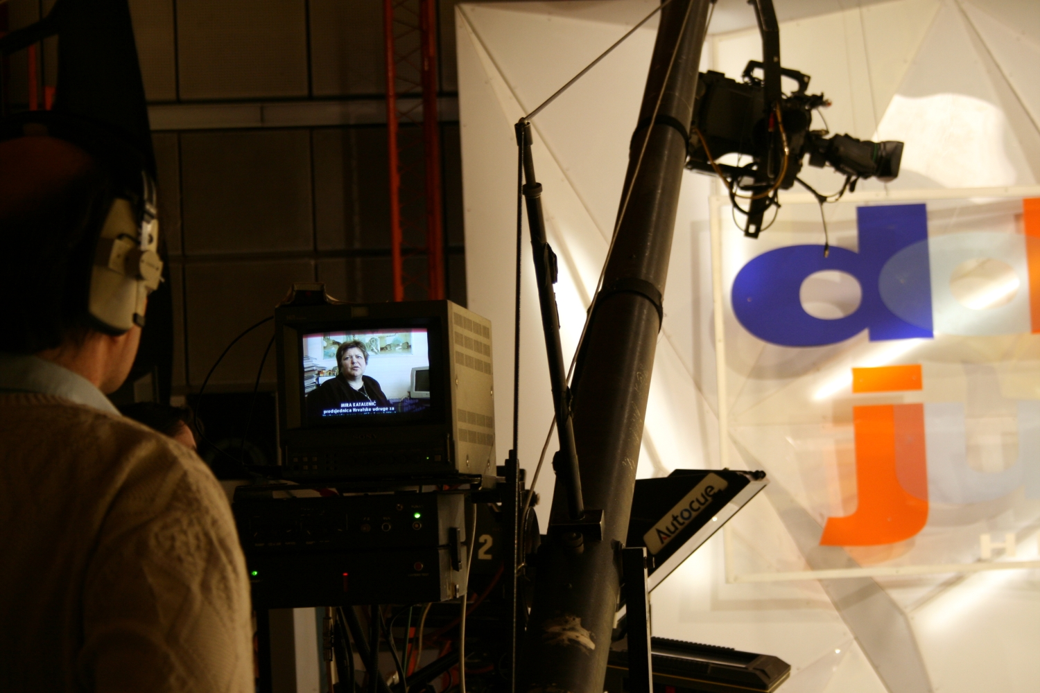 snimatelj emisije Dobro jutro, Hrvatska HRT-a, Zagreb, Hrvatska